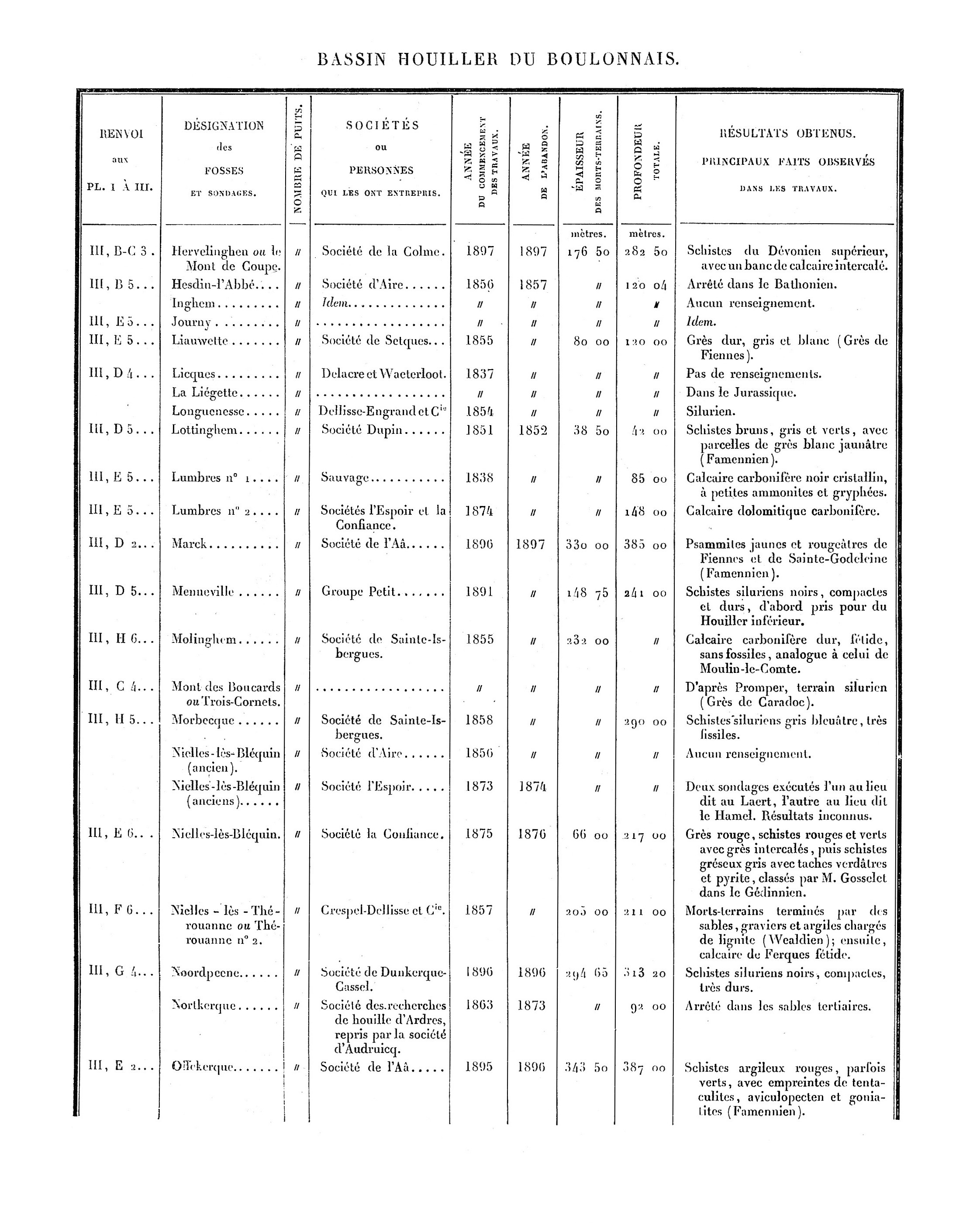 Liste des puits de mine et des sondages. Mines du Boulonnais. Document extrait de Étude des Gîtes Minéraux de la France. Topographie Souterraine du Bassin Houiller du Boulonnais ou Bassin d'Hardinghen, par A. Olry, ingénieur en chef des Mines. Chapitre IX, pages 172 à 189.